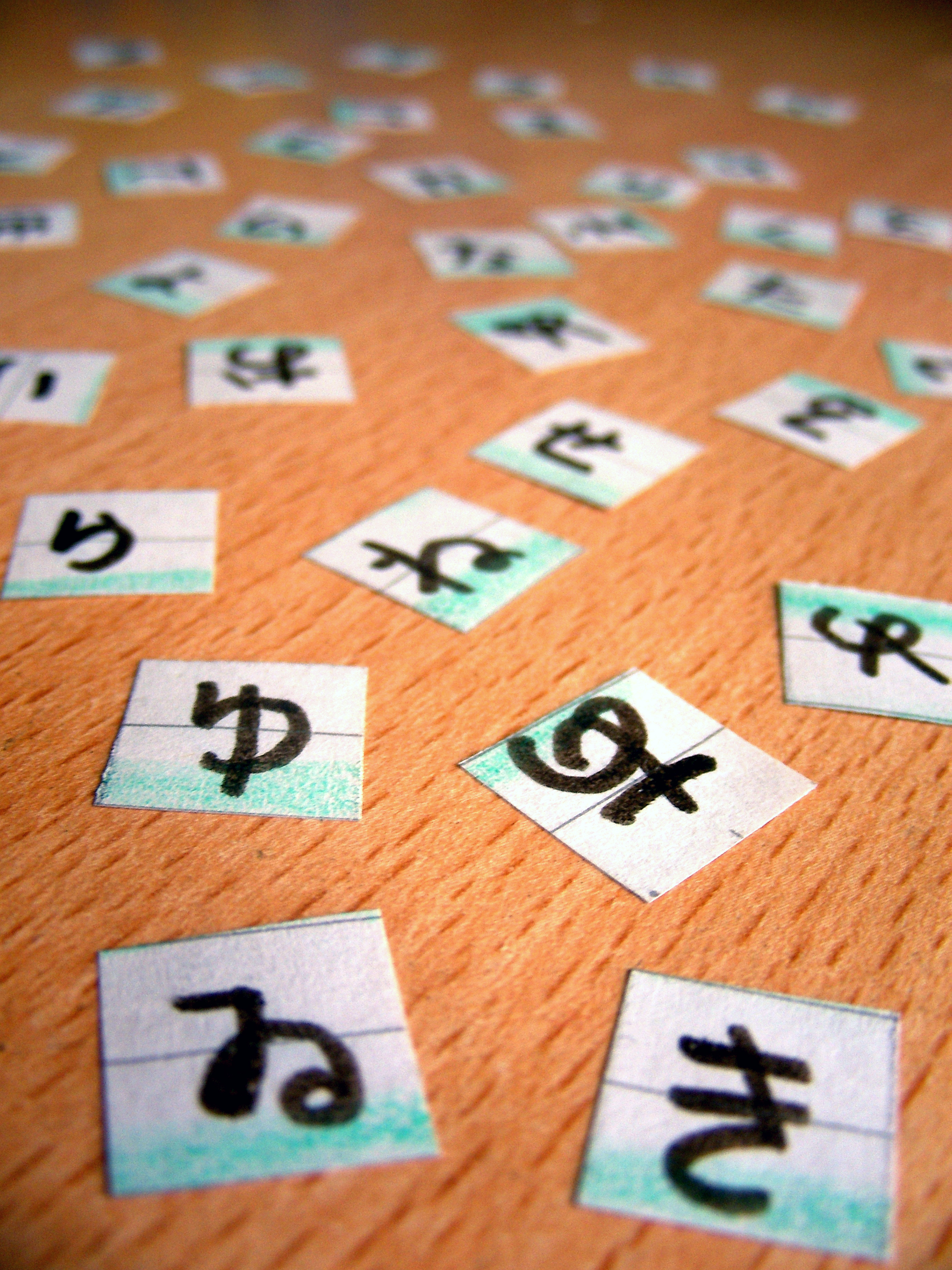 Uno de serie de experimentos con enfoque hecho con pedazos de papel de letras del alfabeto hiragana.